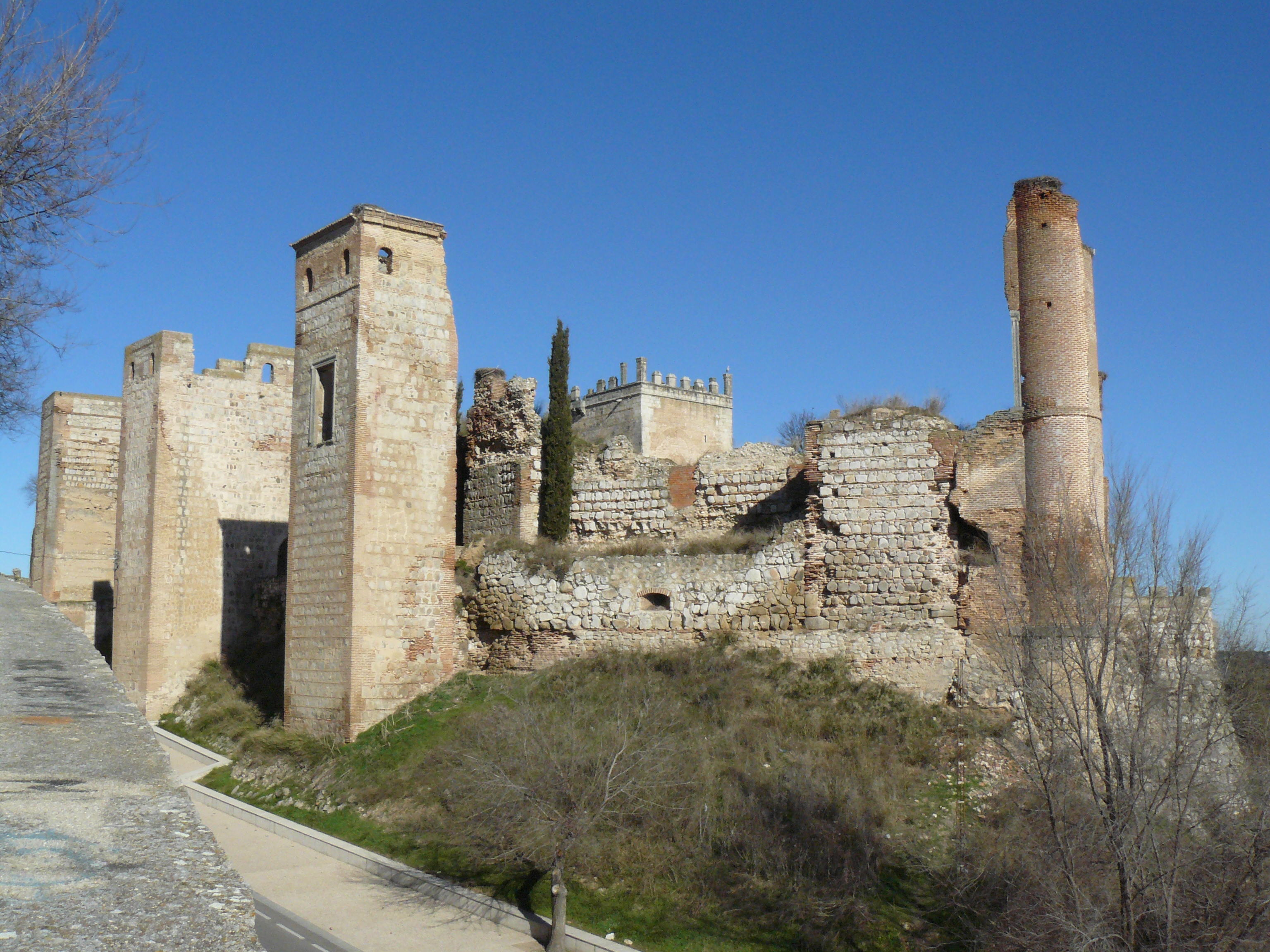 Castillo de Escalona, Toledo.